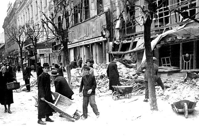 Фотографије бомбардованог Београда 06. 04. 1941. и улазак окупатора у Београд априла 1941.